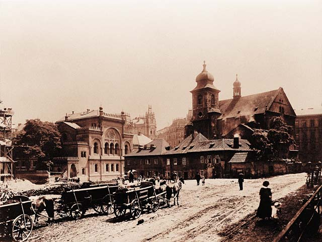 V období před první světovou válkou byly bourány oblasti východní části ghetta. Bourání bloku domů v okolí kostela sv. Ducha a Španělské synagogy.